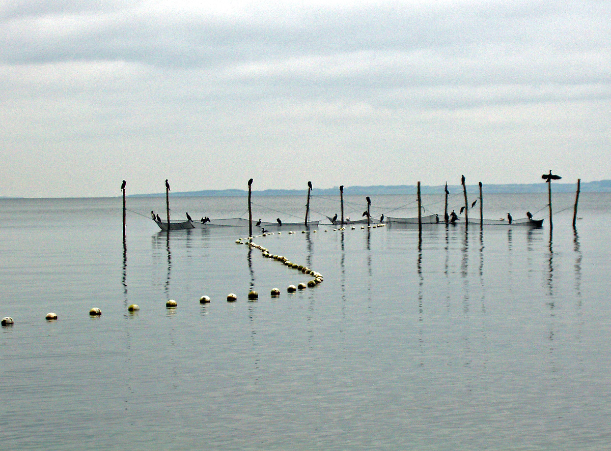 Bundgarnsanlæg med Skarver, i Århusbugten, Denmark